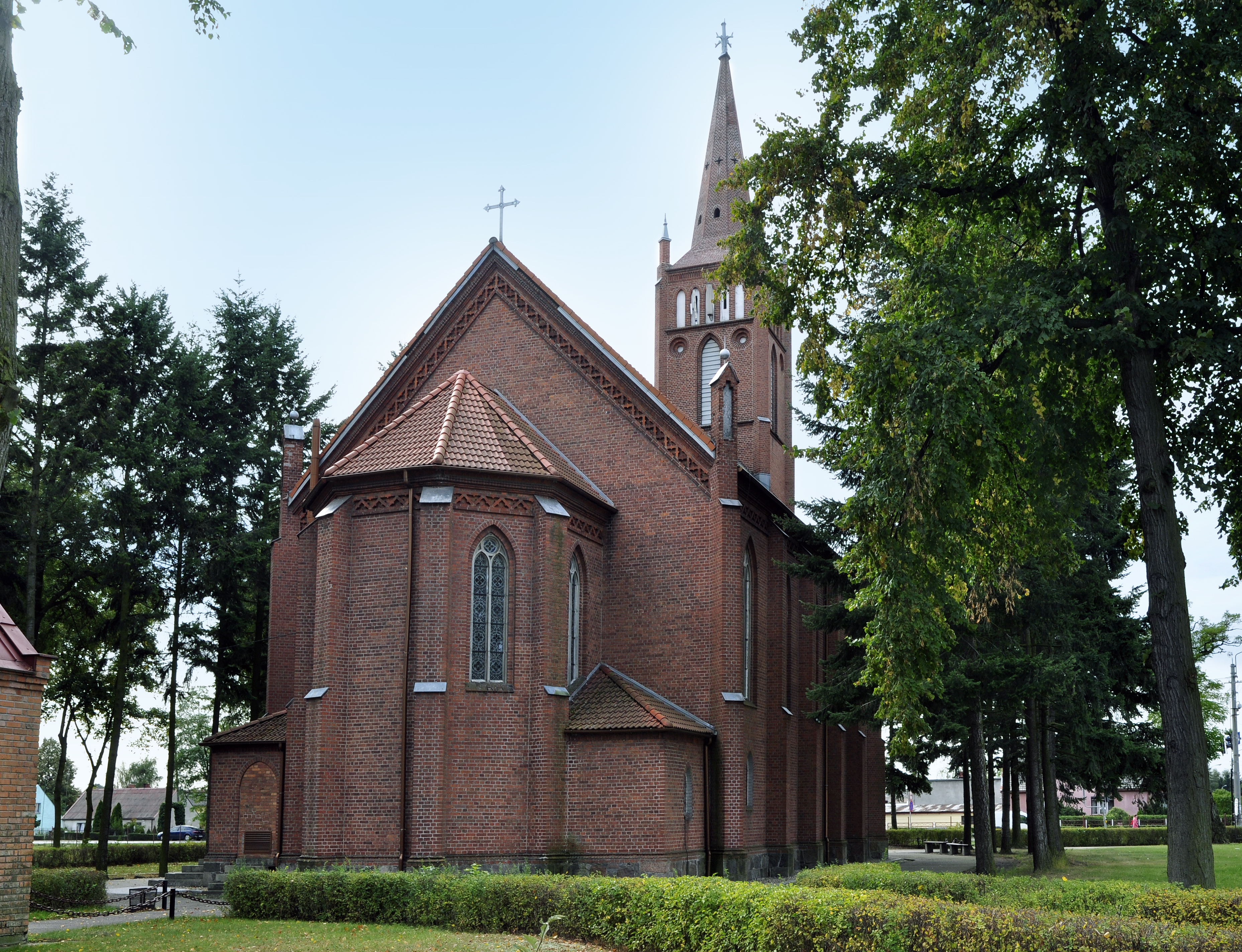 kościół ewangelicko-augsburski, ob. rzym.-kat. par. pw. Niepokalanego Poczęcia NMP, 1867